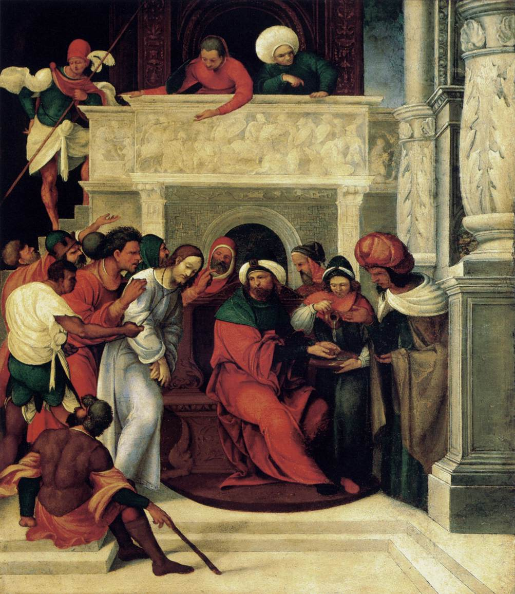 Cristo ante Pilatoslabel QS:Les,"Cristo ante Pilatos"